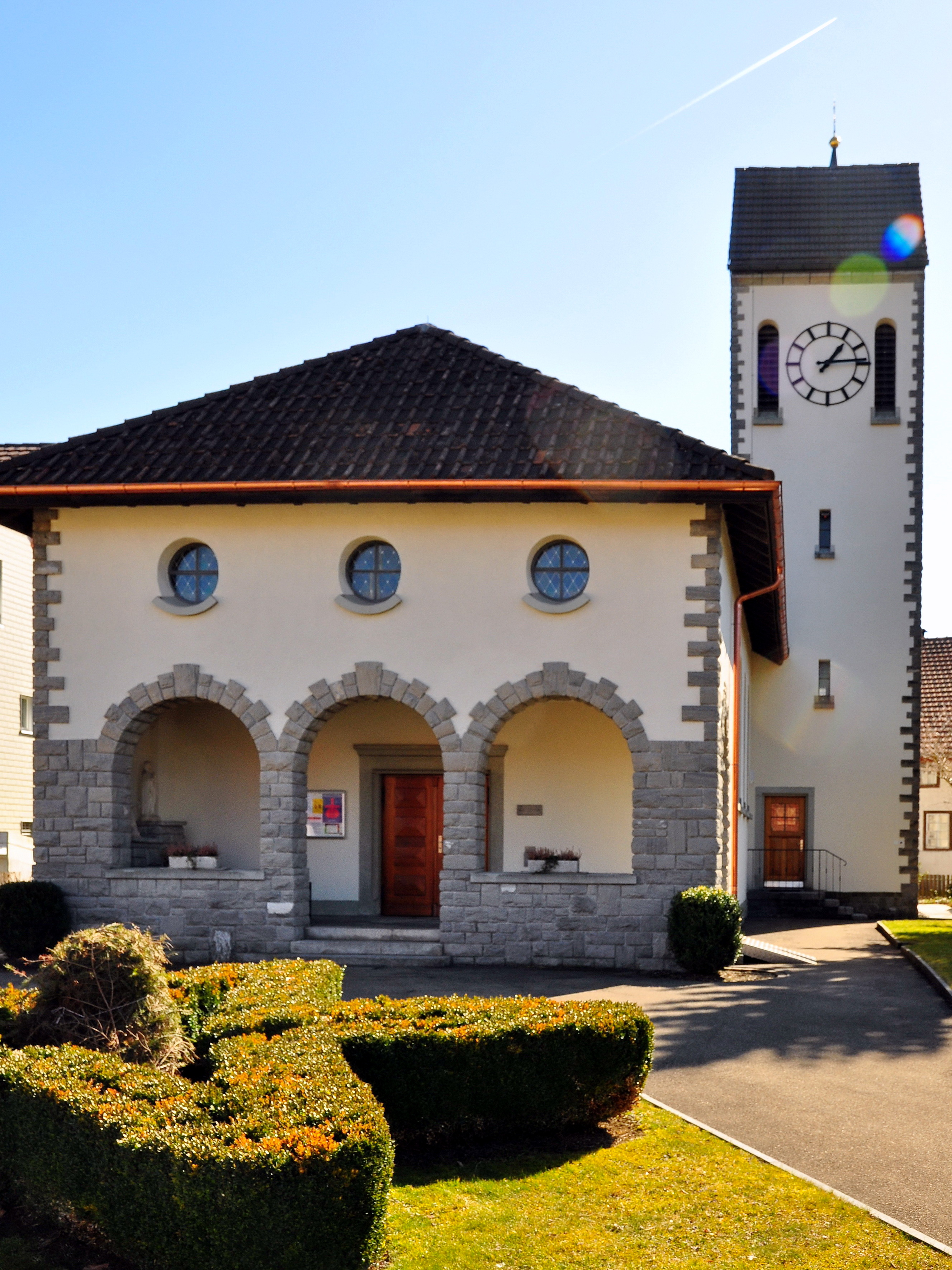 Wagen in Jona (Switzerland)